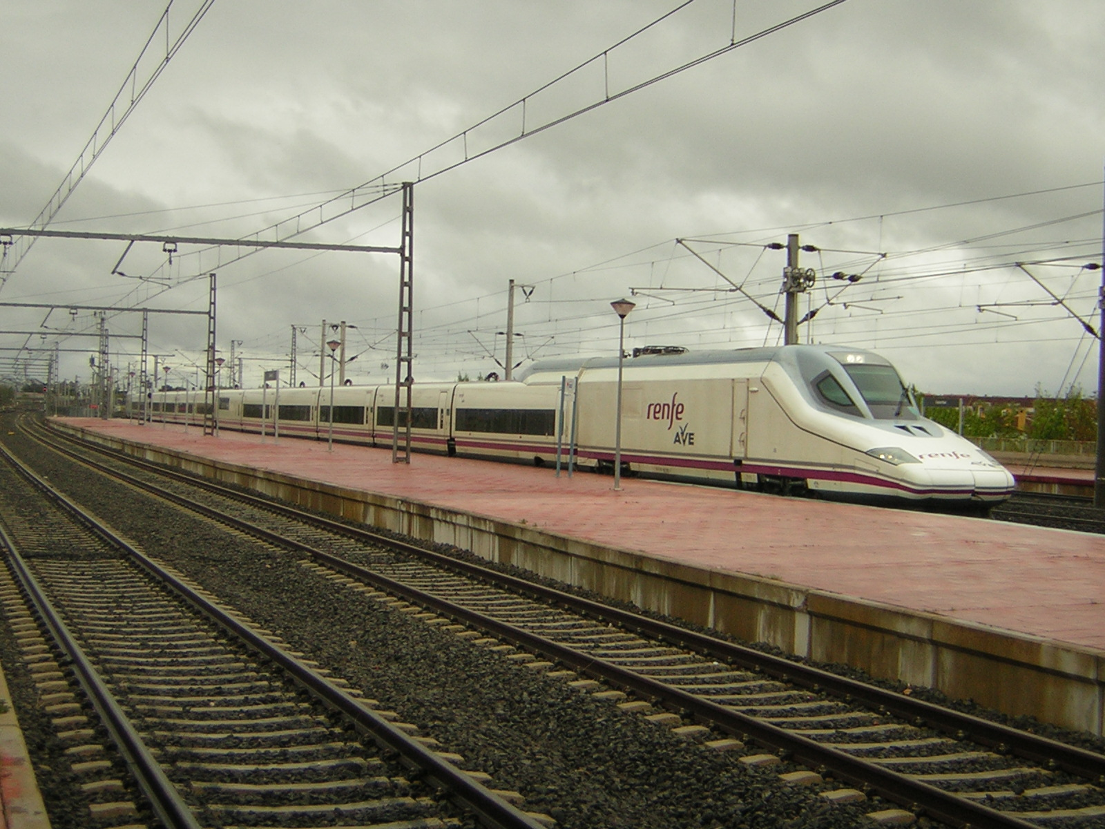 Tren de Alta Velocidad Talgo 350 (Renfe serie 102) en Ciudad Real